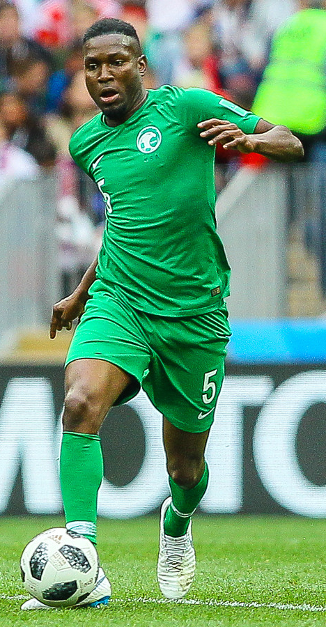 Сборная России бушует. Матч открытия удался на славу!